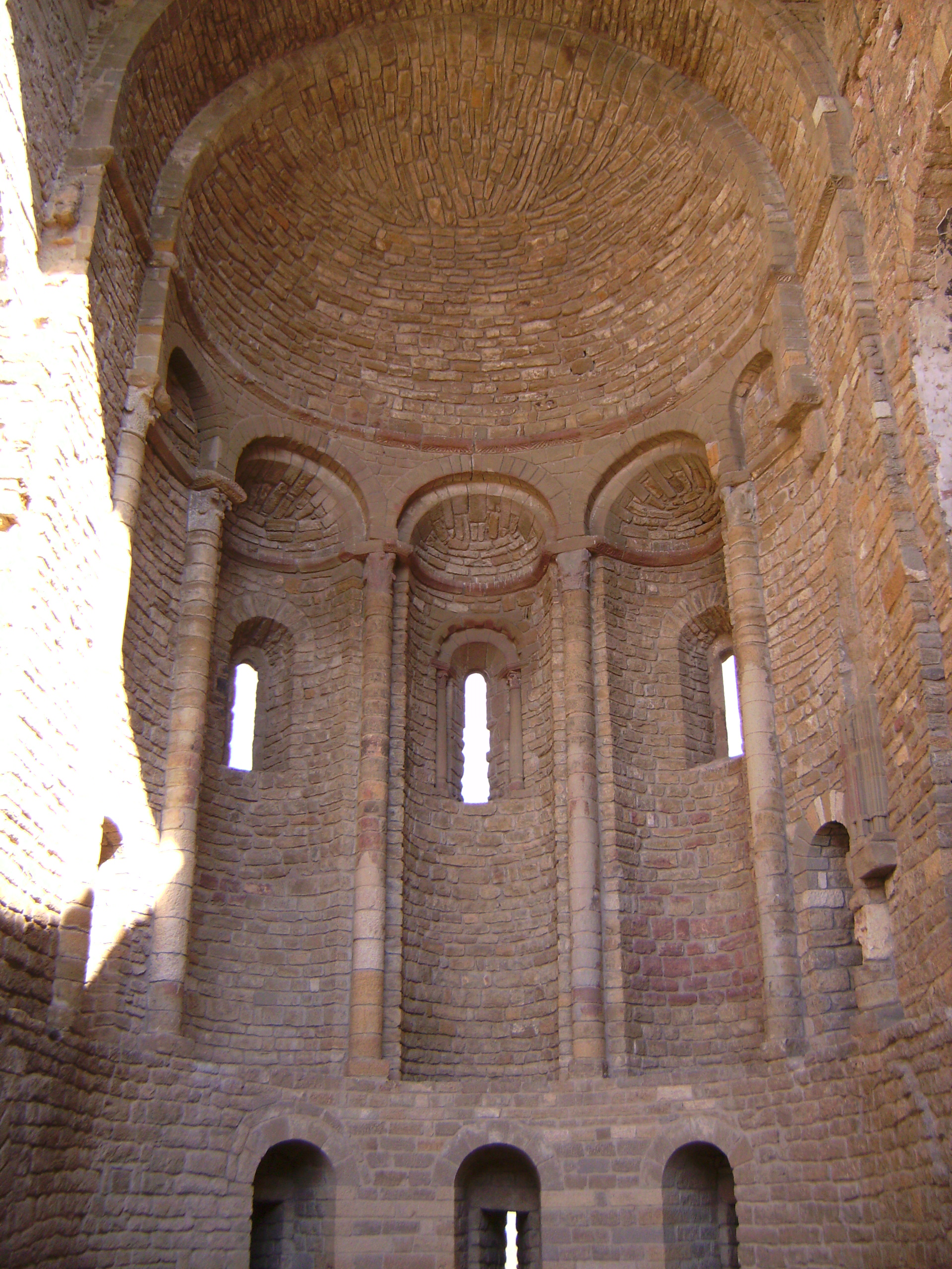 Ager - Colegiata de Sant Pere (Iglesia 3)